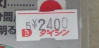 値札シールにいまも残るＤＳマーク